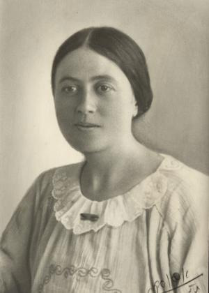 טובה רוטמן